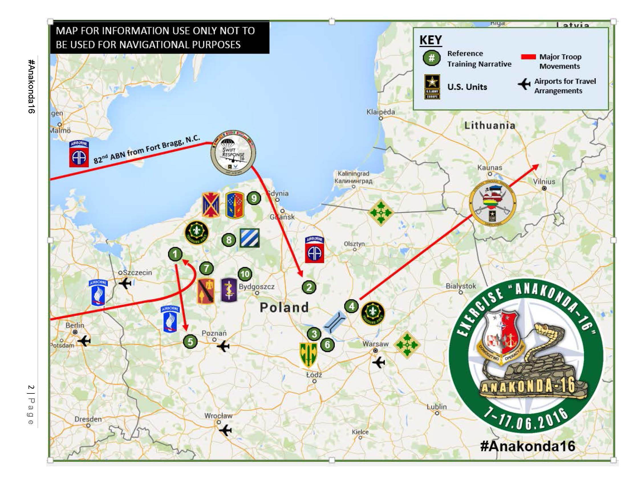 Anakonda16 #RoadToAnakonda